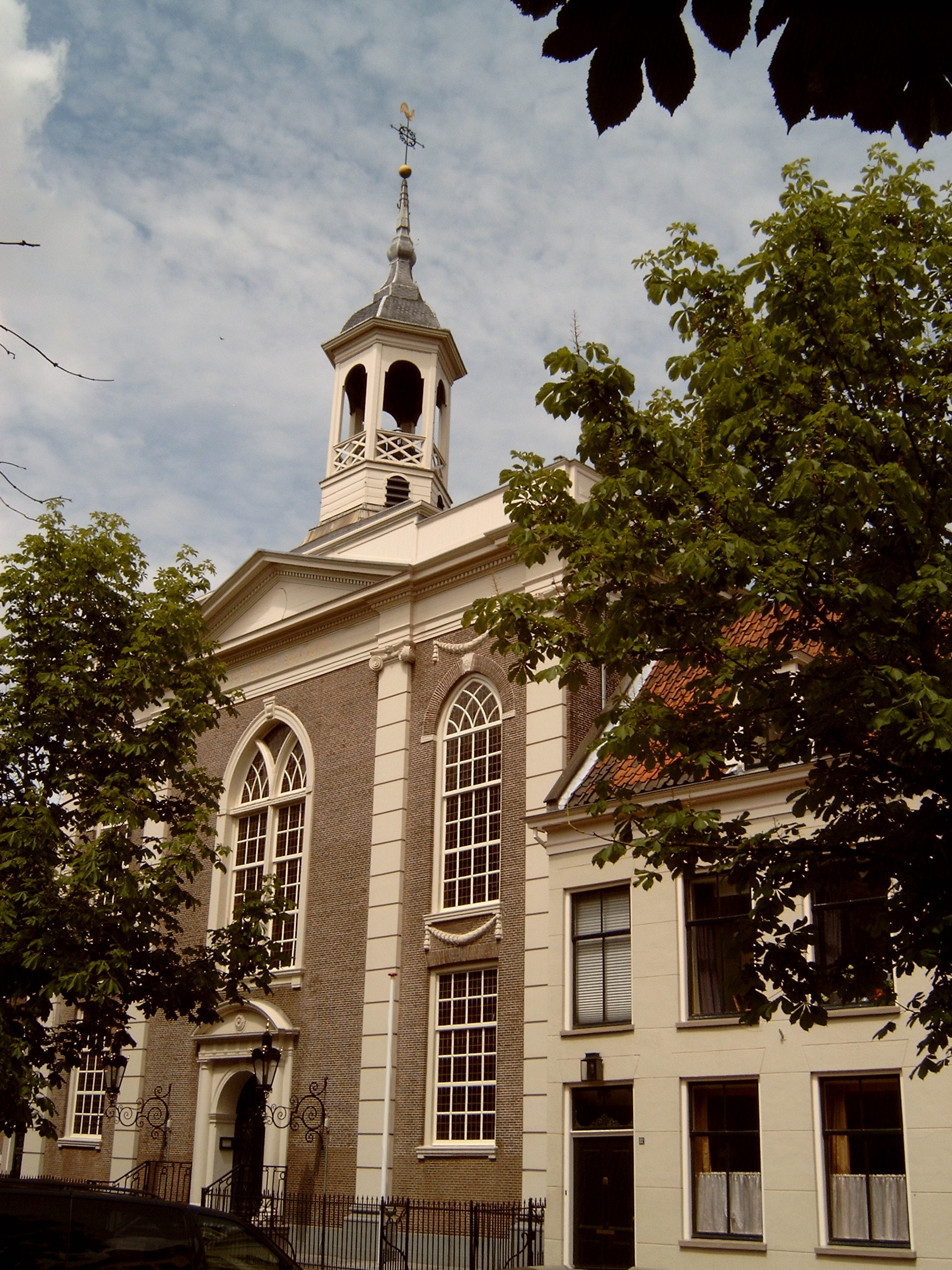 Amersfoort, St. Franciscus-Xaveriuskerk, 't Zand